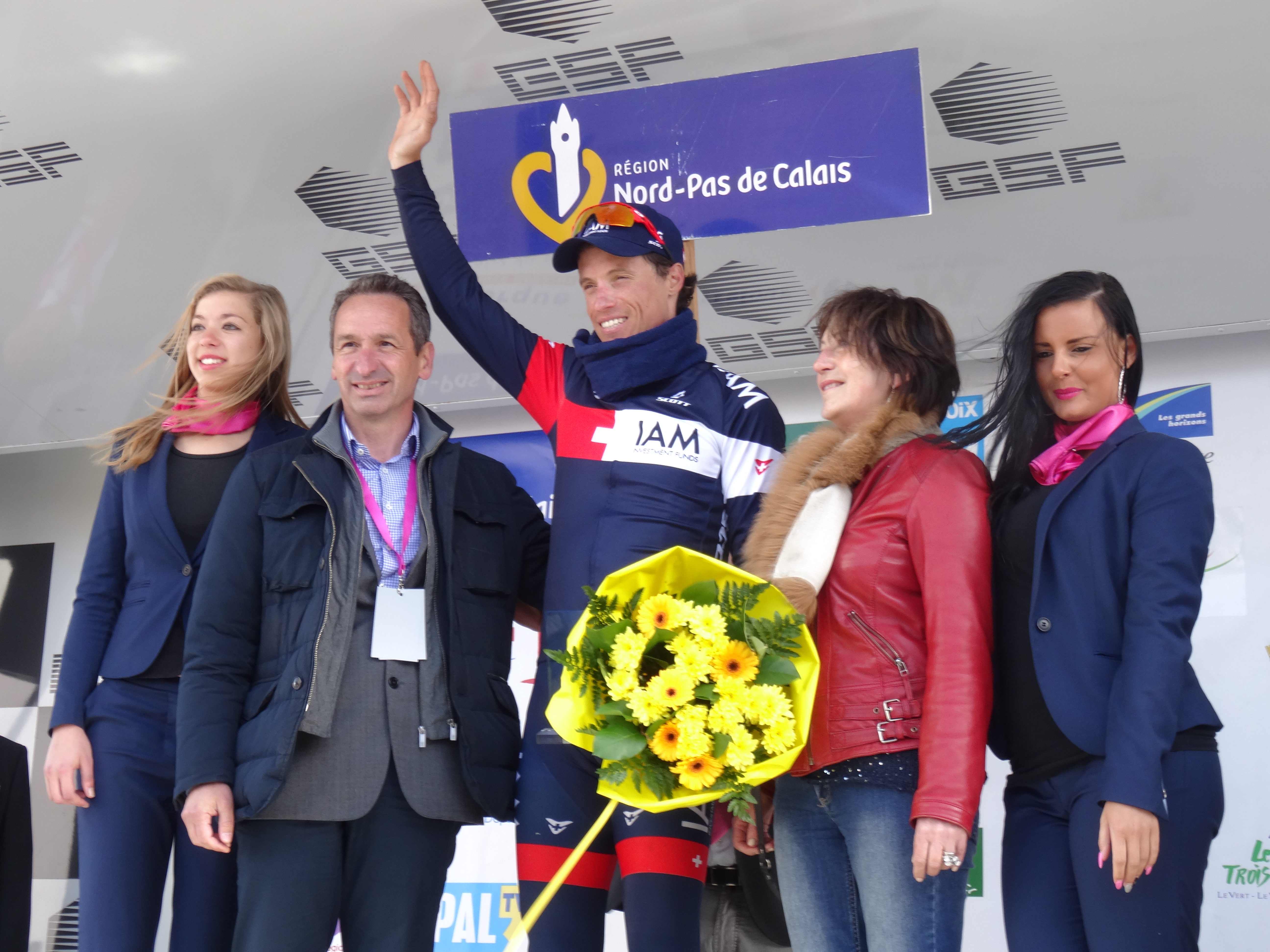 Reportage photographique réalisé le vendredi 9 mai 2014 à l'arrivée de la troisième étape de l'édition 2014 des Quatre jours de Dunkerque à Calais, Pas-de-Calais, Nord-Pas-de-Calais, France. Depicted person: Sylvain Chavanel Depicted team: IAM